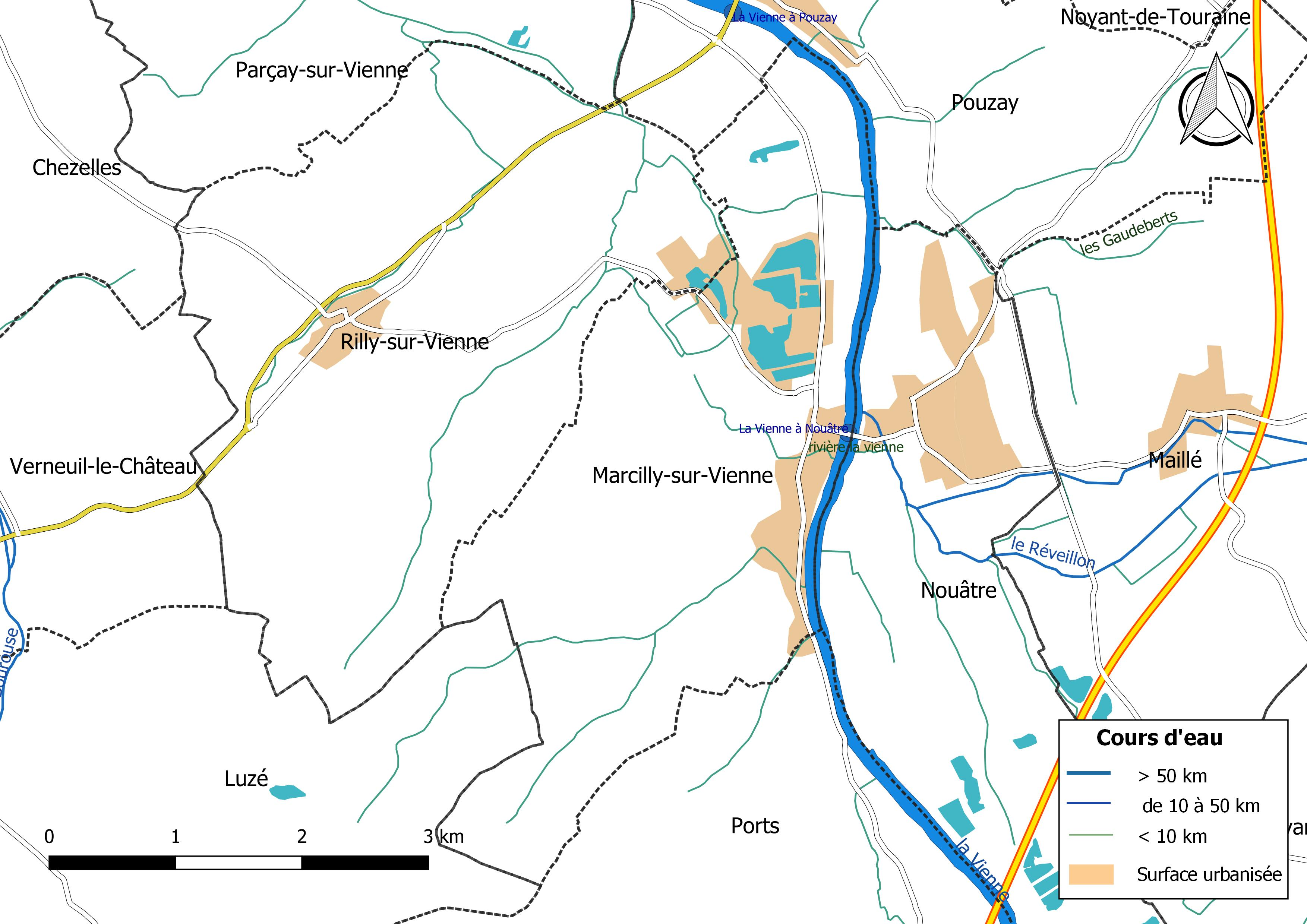 Carte du réseau hydrographique de la commune de Marcilly-sur-Vienne (France).